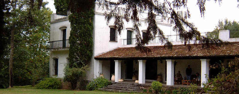 Estancia Parada Arteaga, Southern Departamento Florida, Uruguay